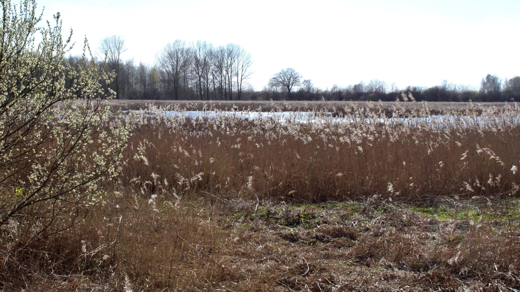 Krēmeri, dīķis lieguma DA no Voleru ielas puses